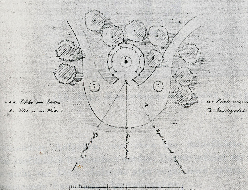 Grundriss der Schießhütte, Entwurf von Persius, 1841